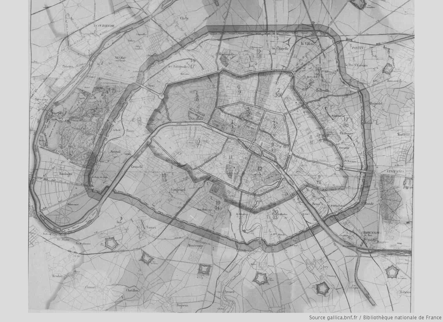 Page 130